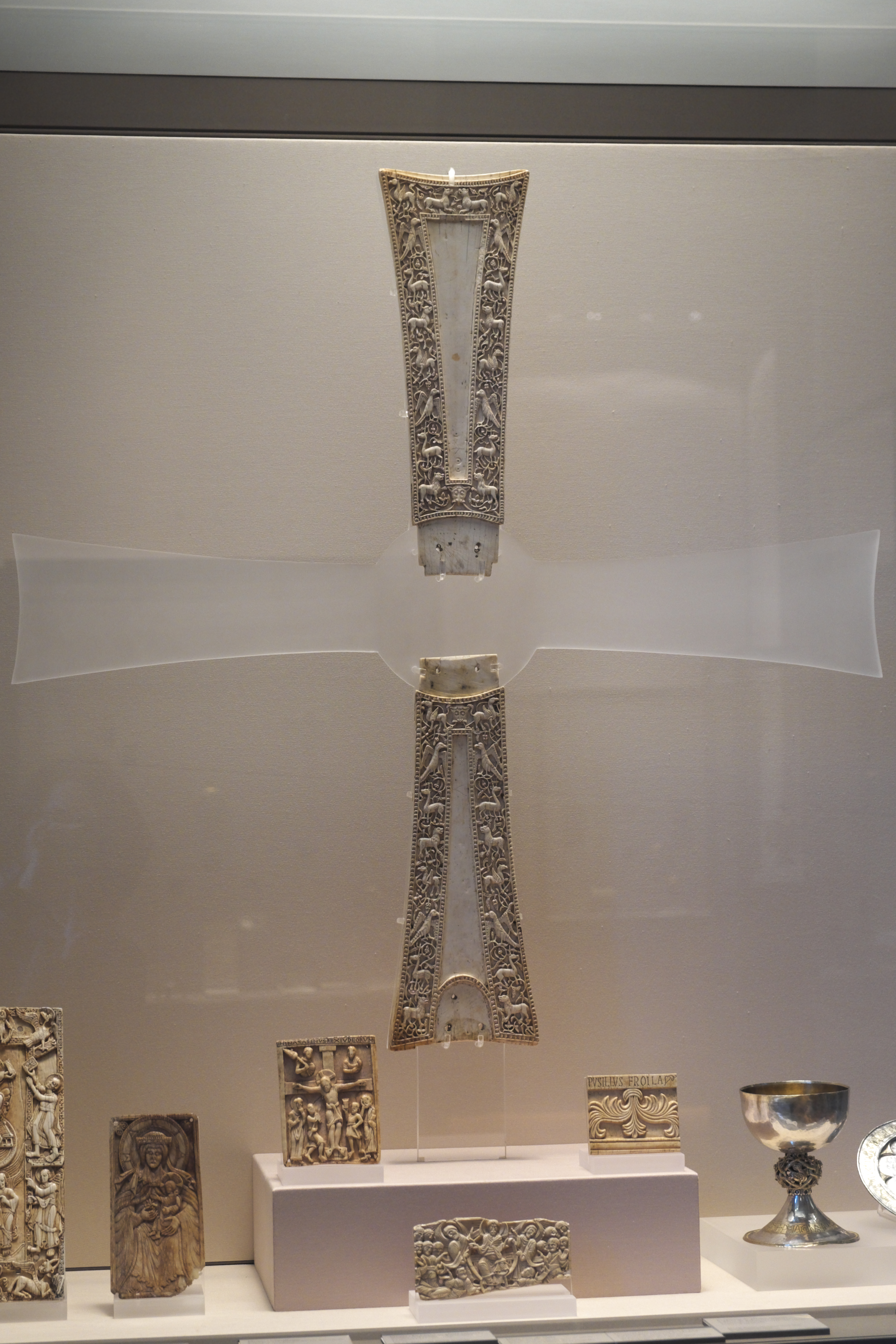 Mozarabisches Prozessionskreuz aus dem Kloster San Millán de la Cogolla in La Rioja (Spanien), zwei Arme befinden sich heute im Louvre in Paris (Frankreich), Elfenbein, 10. Jahrhundert ( Deux bras de croix processionnelle)